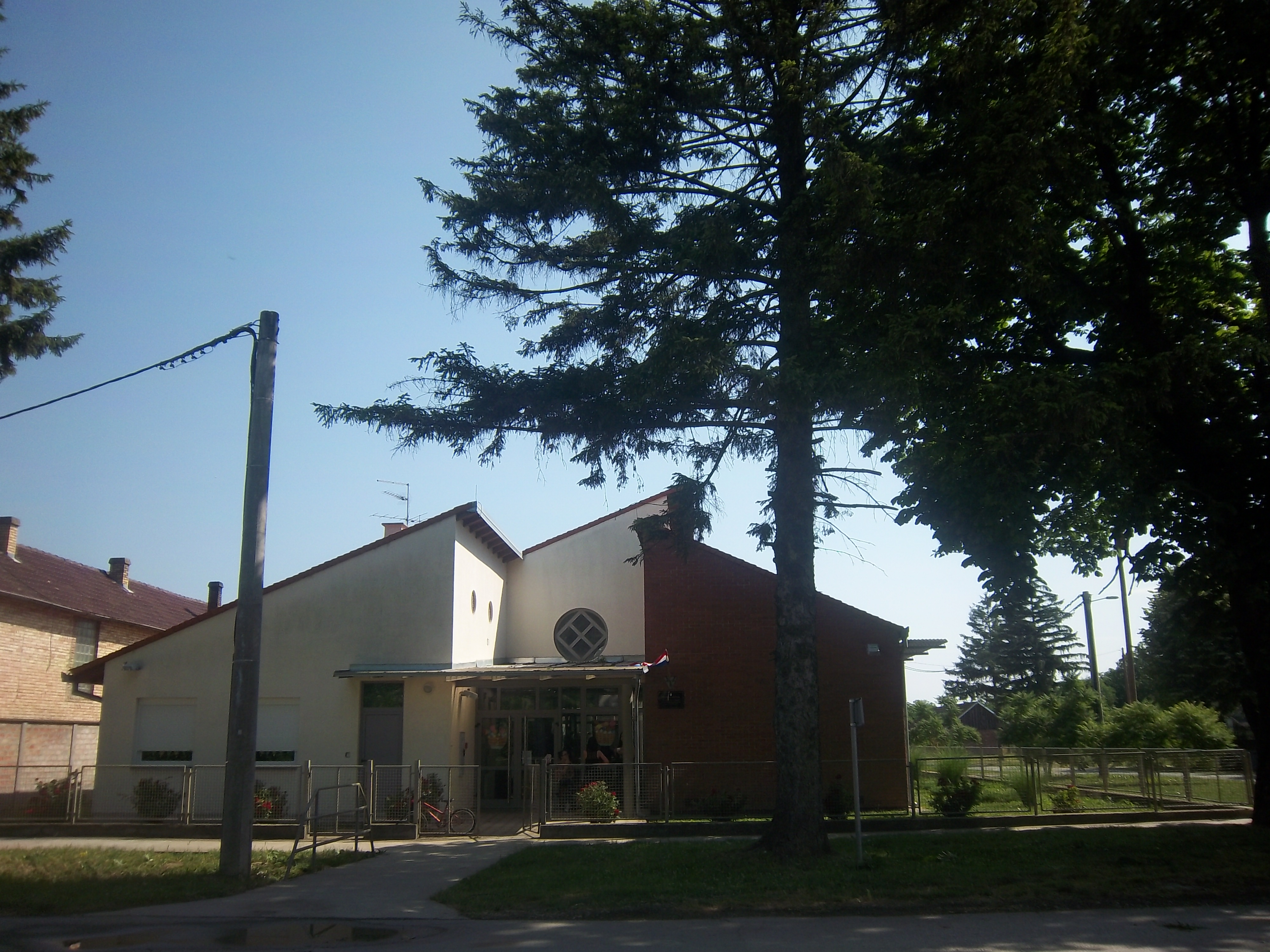 Српски (ћирилица): Основна школа у селу Миклушевци у источној Славонији (Општина Томпојевци, Република Хрватска).